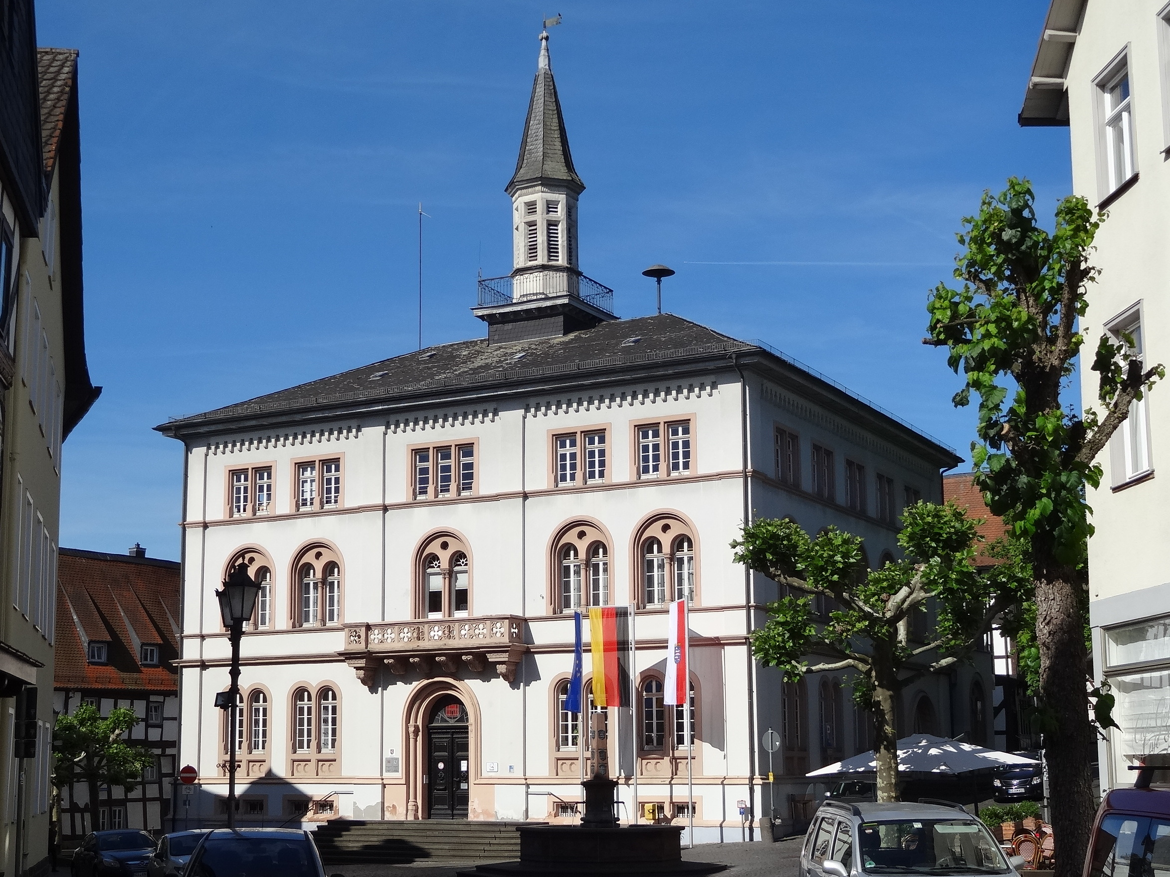 Unterstadt 1 (Lich)